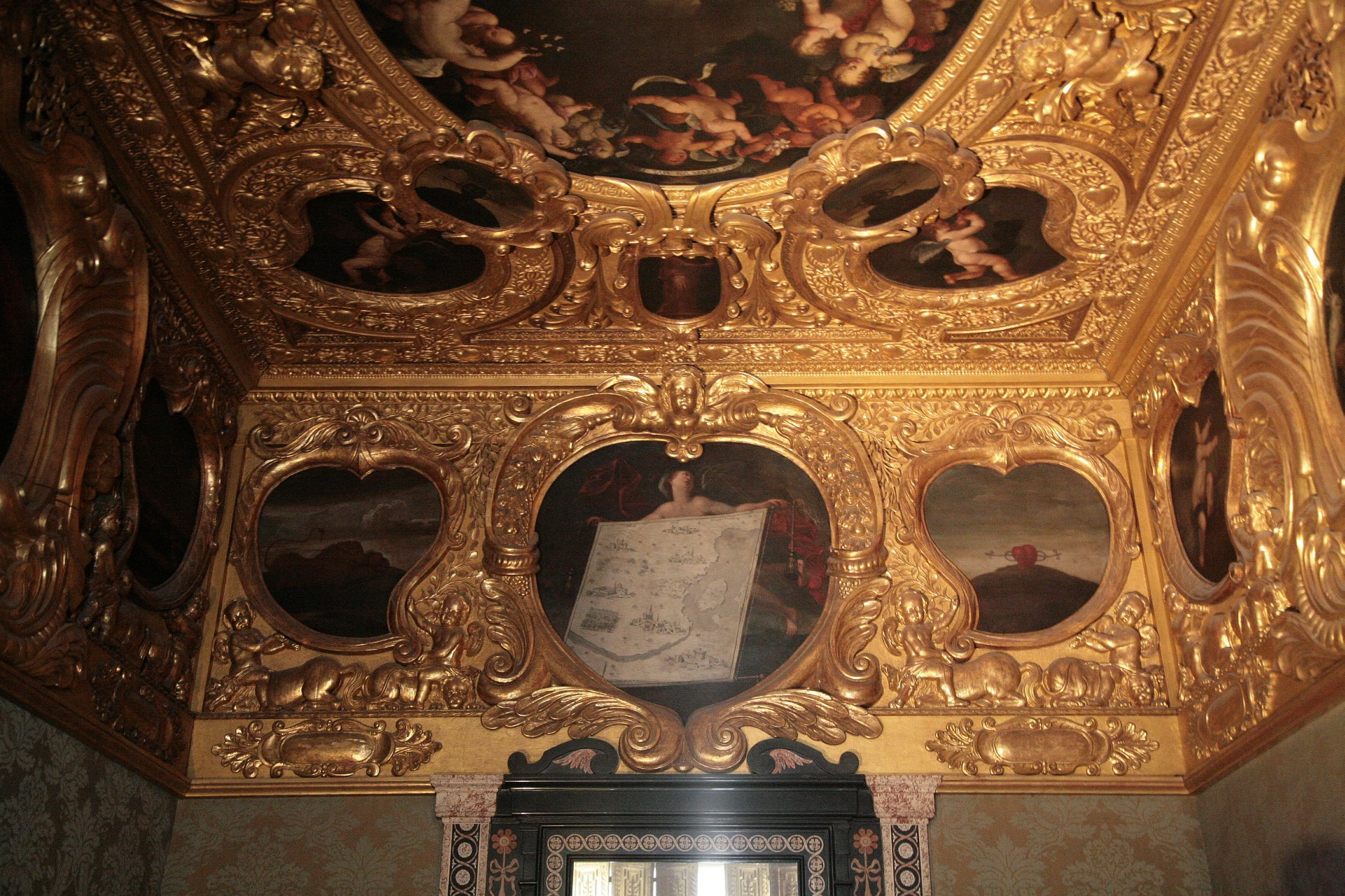 Stuckdecke des Herzkabinetts der Kurfürstin Henriette Adelaide in der Münchner Residenz von 1666 (Foto 2011)